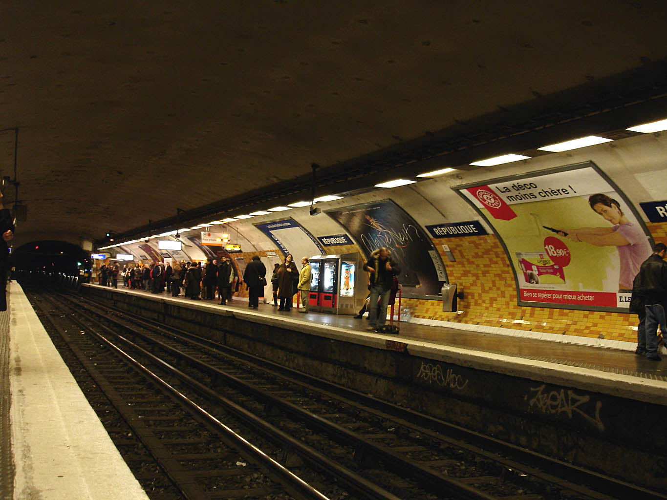 Métro de Paris (France) - ligne 5 - Station République